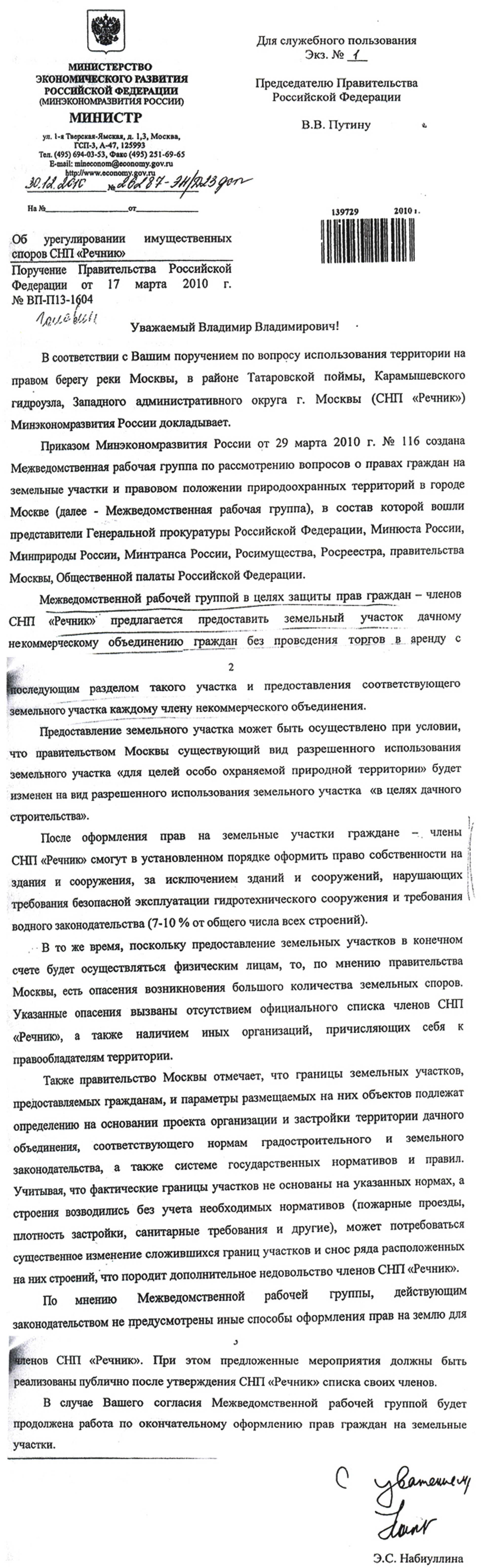 Об урегулировании имущественных споров СНП "Речник" Председателю Правительства Российской Федерации В.В. Путину